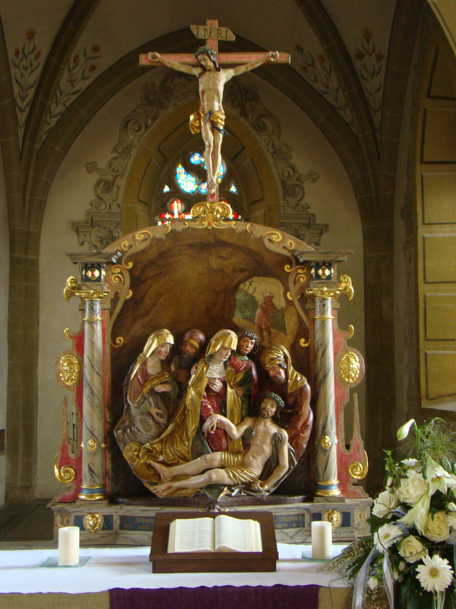 Altar der Kilianskirche in Obersulm-Sülzbach